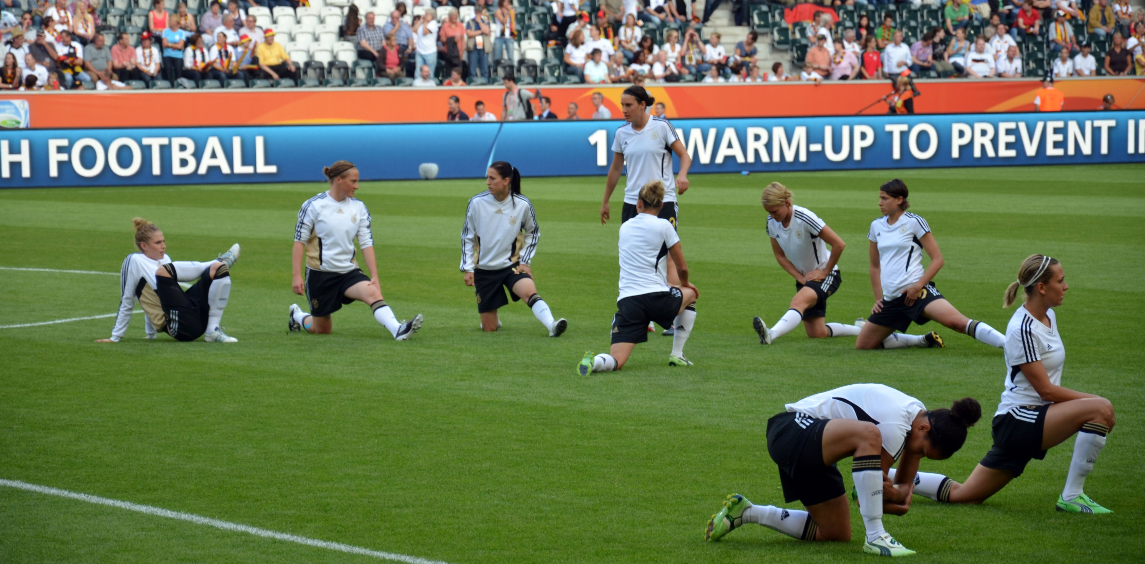 WM Vorrundenspiel zwischen Frankreich und Deutschland am 5. Juli 2011 im Borussiapark in Mönchengladbach